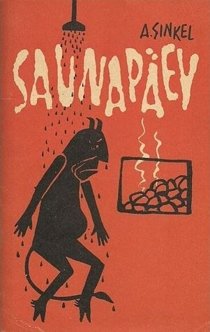 Aristarch Sinkeli följetonikogumiku "Saunapäev" esikülg